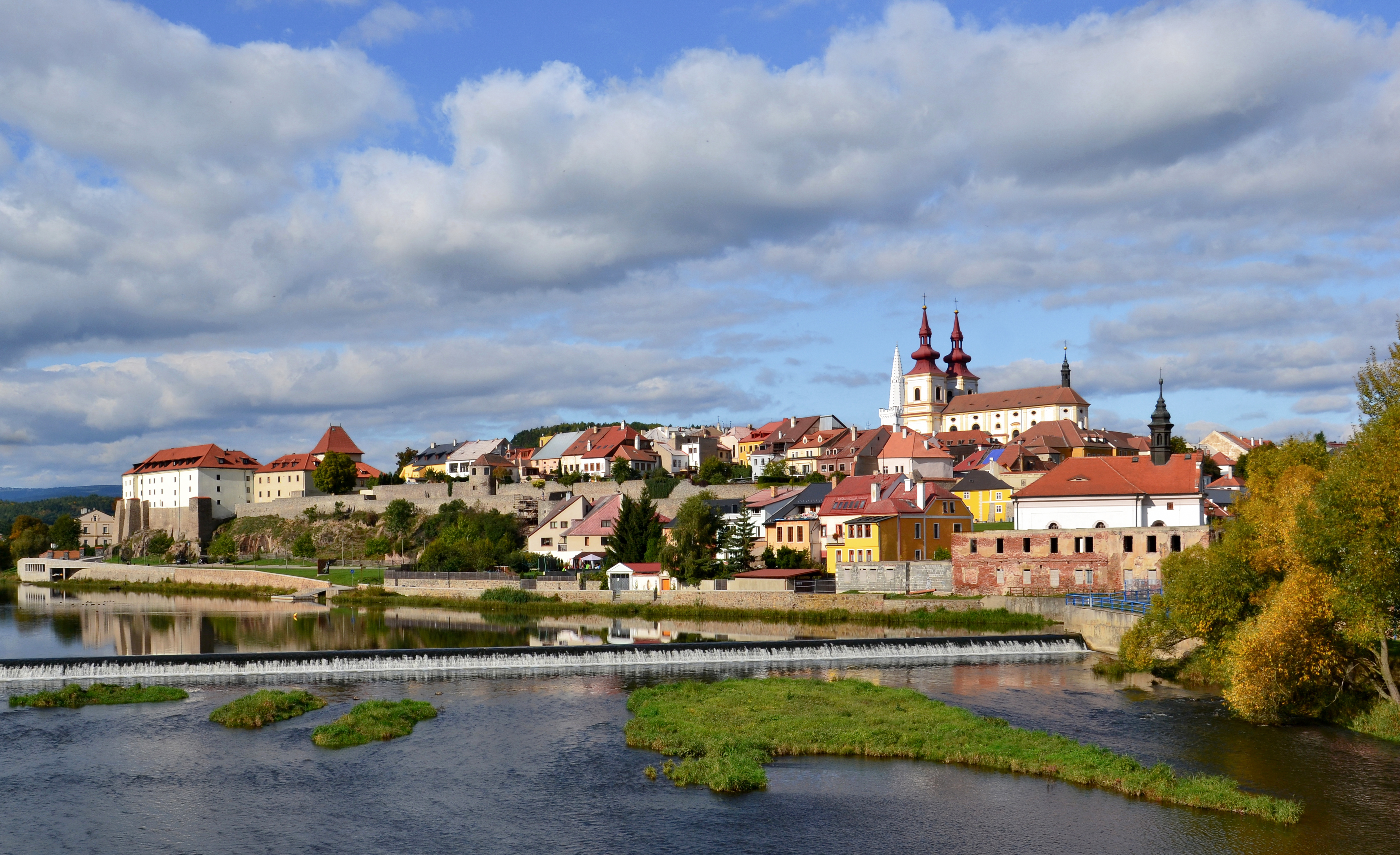 Historické centrum Kadaně z mostu přes Ohři